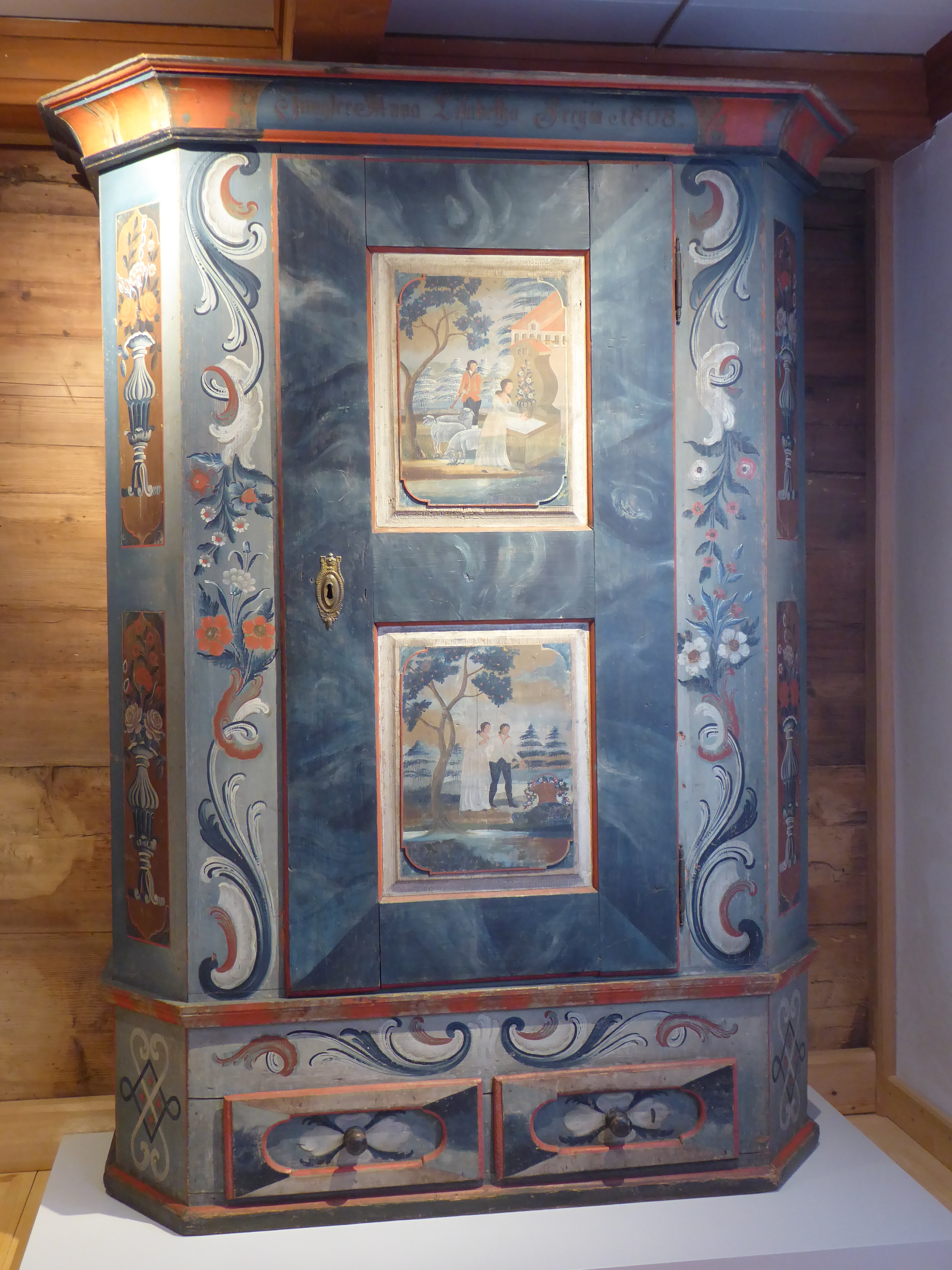 Kasten für «Jungfer Anna Lisabetha Freyin» vom «Maler der Pärchenszenen» (Zuschreibung), 1808